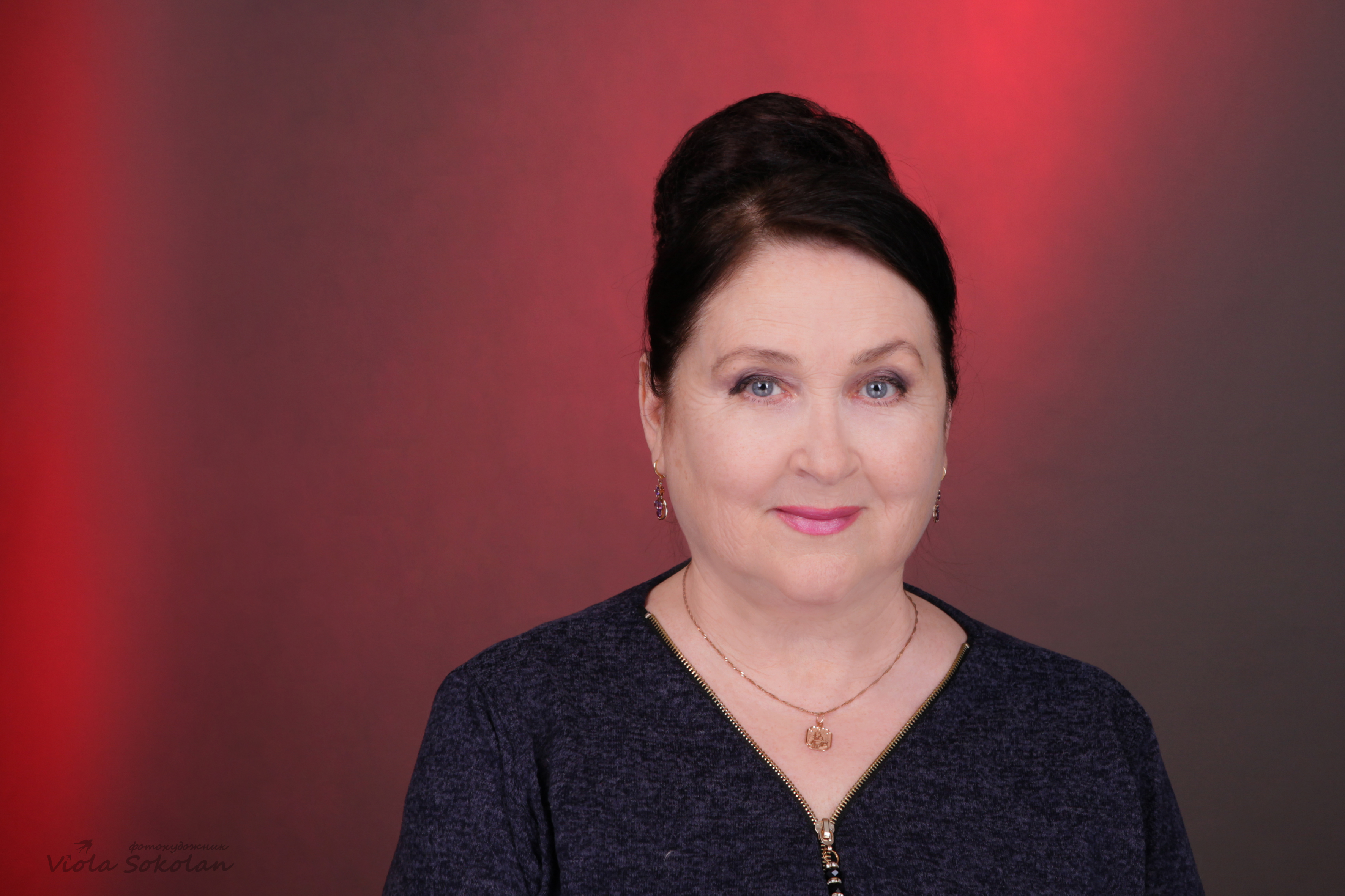 Игнашкина Татьяна, Заслуженная артистка Украины